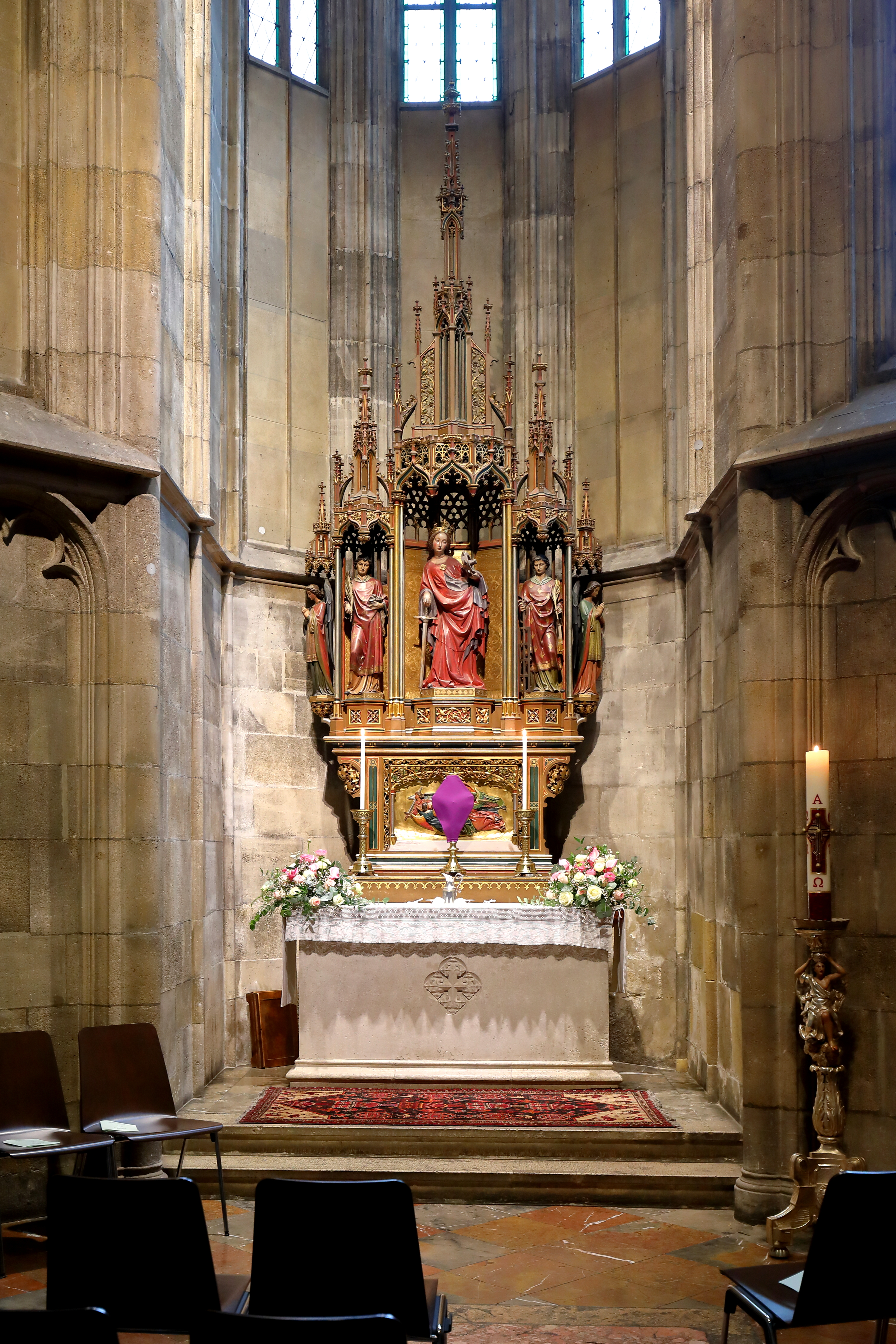 Der Katharinenaltar in der Katharinen- bzw. Taufkapelle des Stephansdomes in der österreichischen Bundeshauptstadt Wien. Die ostseitig an die Turmhalle des Südturm angebaute Kapelle wurde um 1380 errichtet. Der neugotische Altar wurde um 1875 errichtet, in dessen Zentrum sich eine Holzstatue (um 1425) der hl. Katharina befindet. Seit 1639 (mit Unterbrechung) ist auch der marmorne gotische Taufstein (1481) in der Katharinenkapelle aufgestellt.